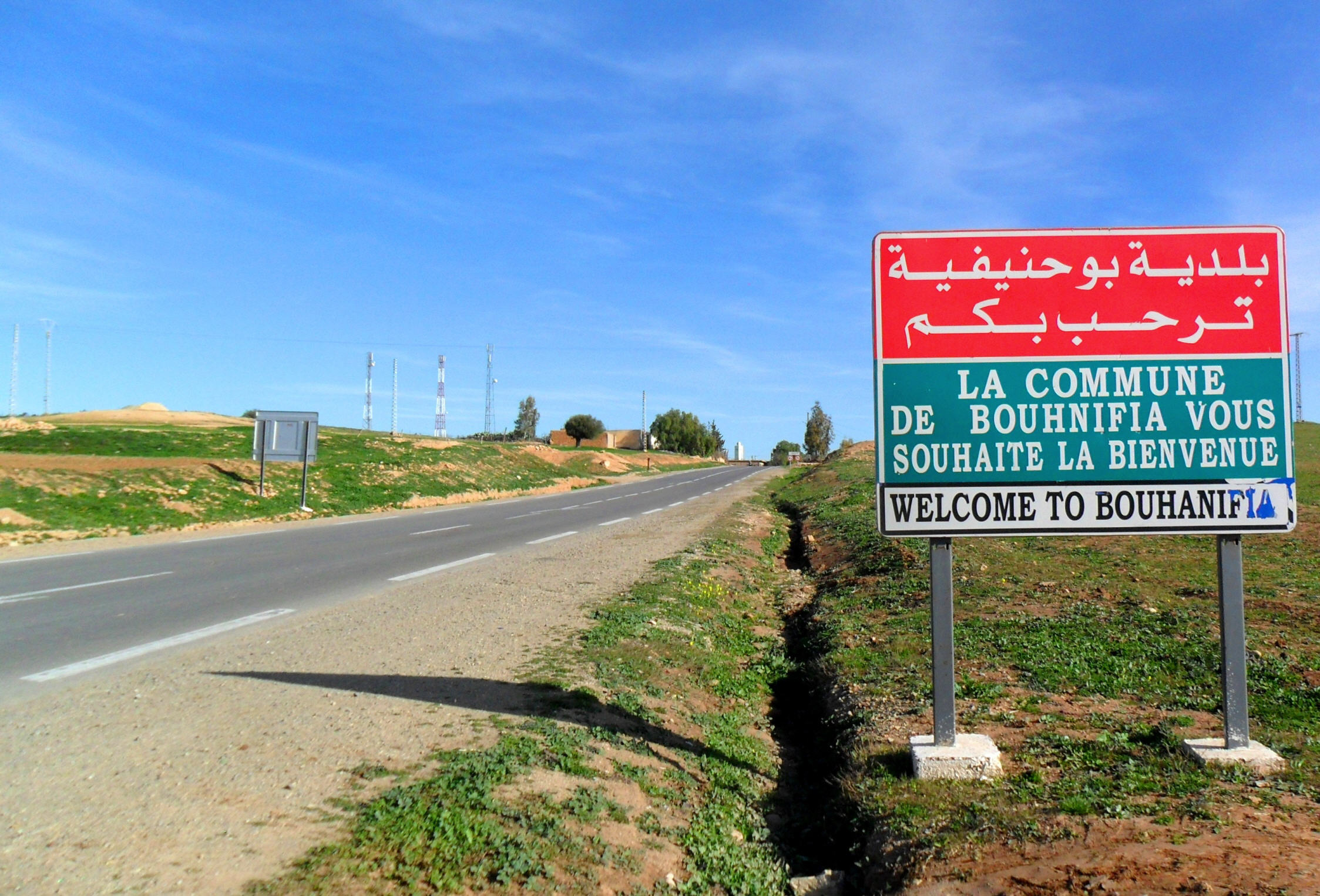 Bienvenue à Bouhnifia بلدية بوحنيفية ترحب بكم